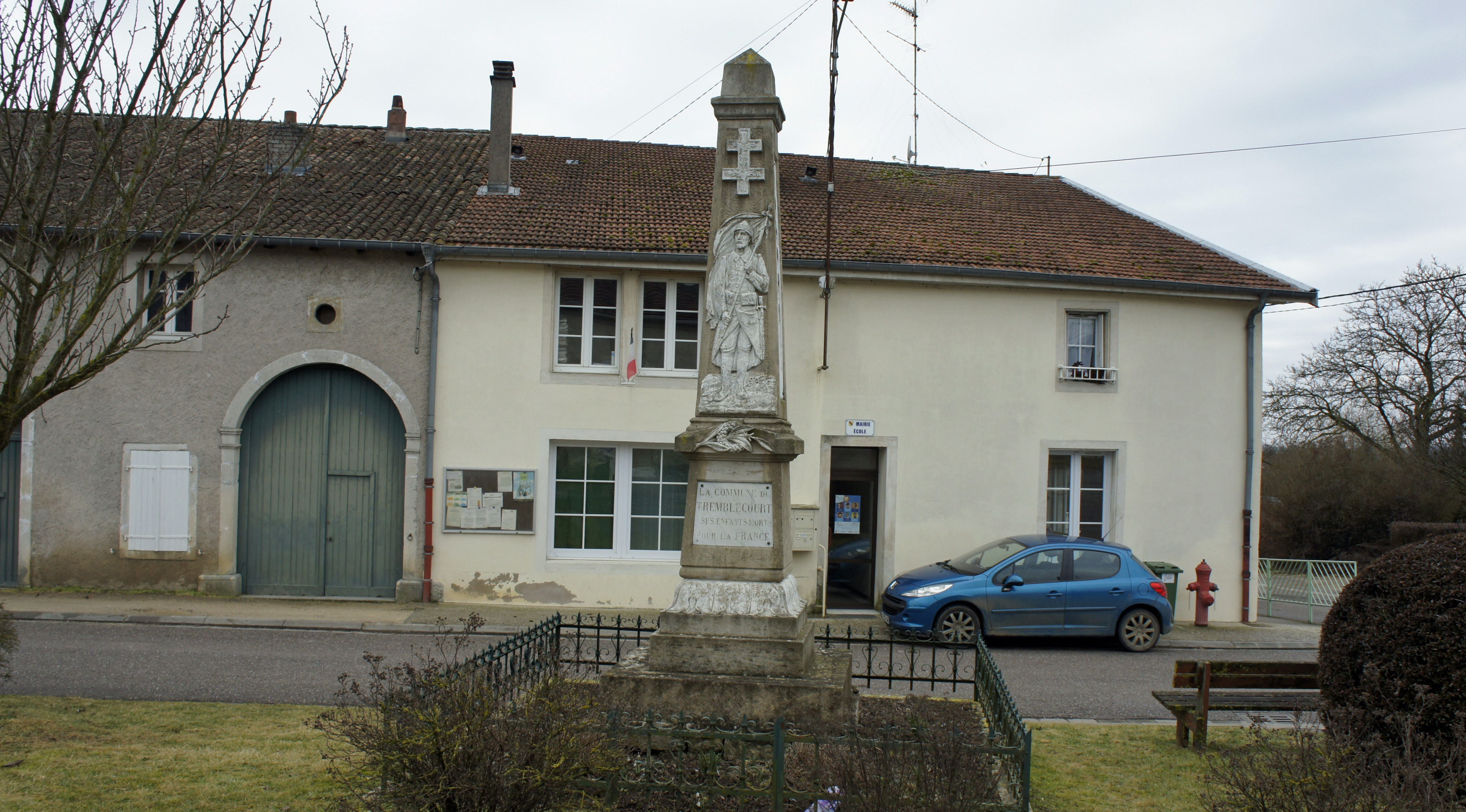 Mairie et monument aux morts de Tremblacourt.